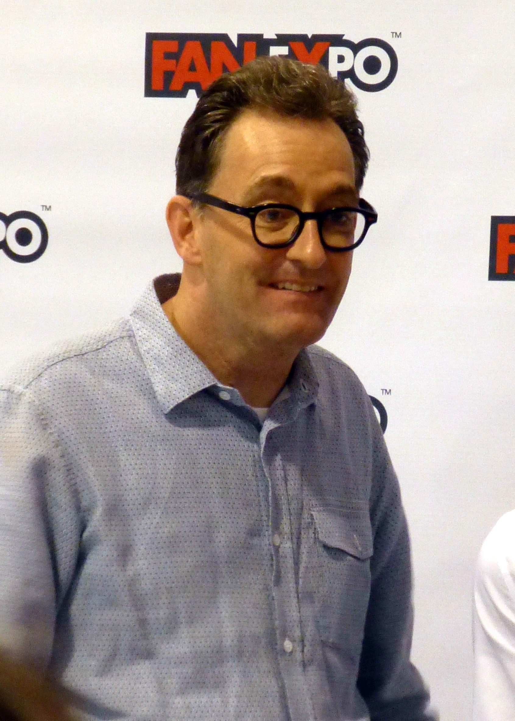 Tom Kenny